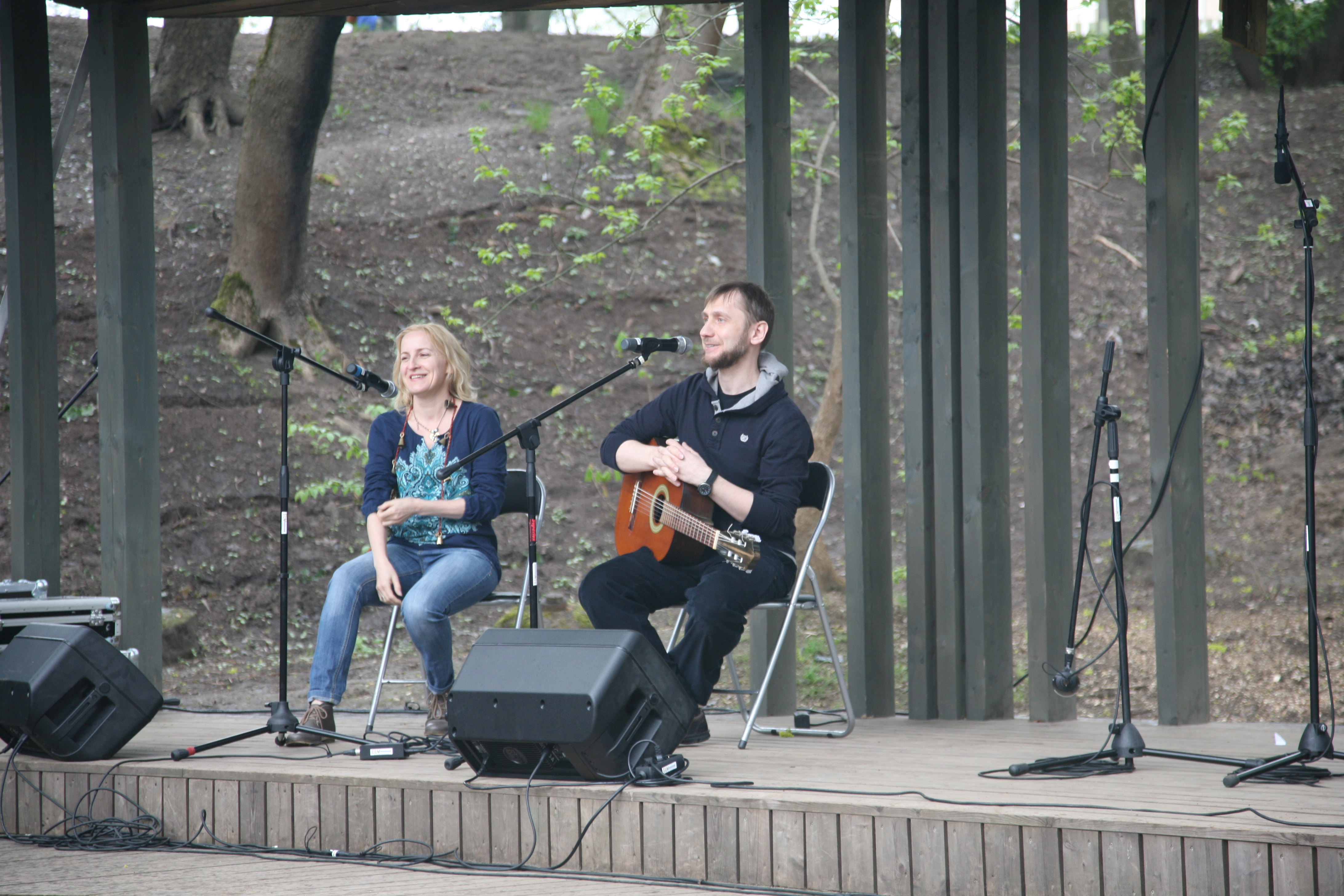 Konstantin Žigulin Prima Vista 2015 avamisel